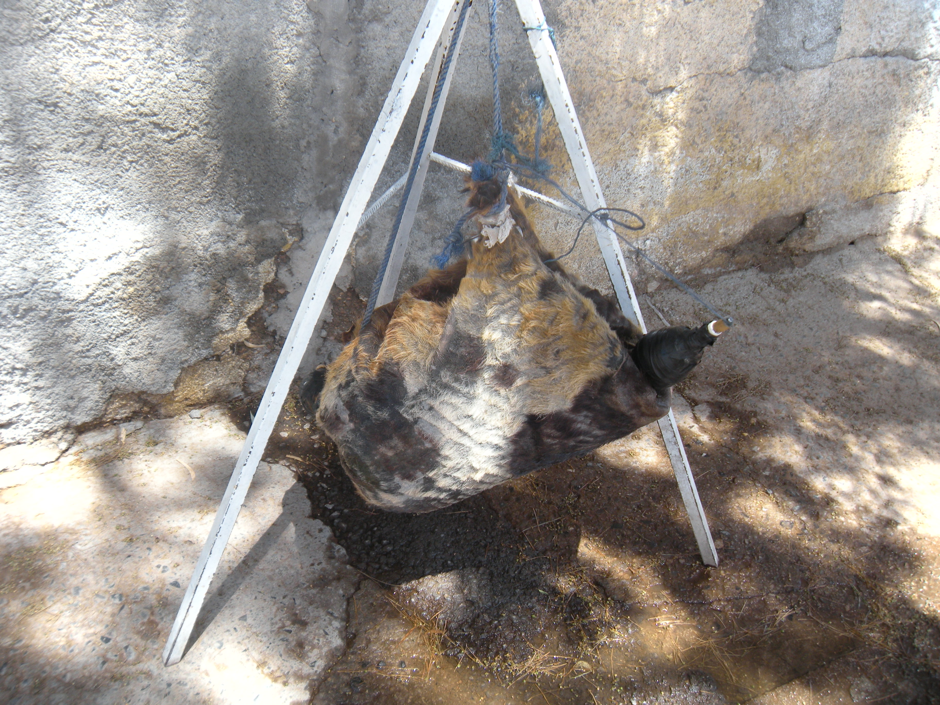 Guerba , ou l'outre auressienne , à Aïn Touta près de Batna.